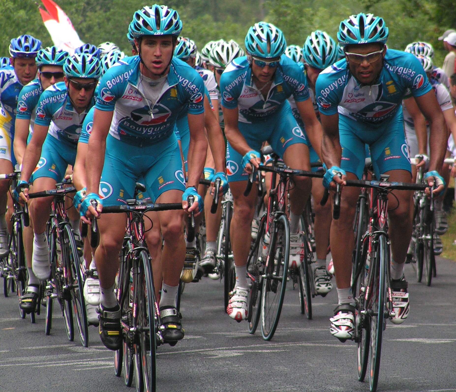 L'équipe Bouygues Telecom à l'avant du peloton lors des Championnats de France 2006 à Chantonnay (Vendée). Photo personnelle prise le 25 juin 2006